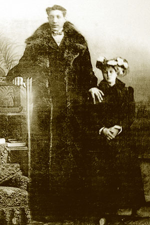 Беларуская (тарашкевіца): Фёдар Махноў і жонка Эўфрасіньня